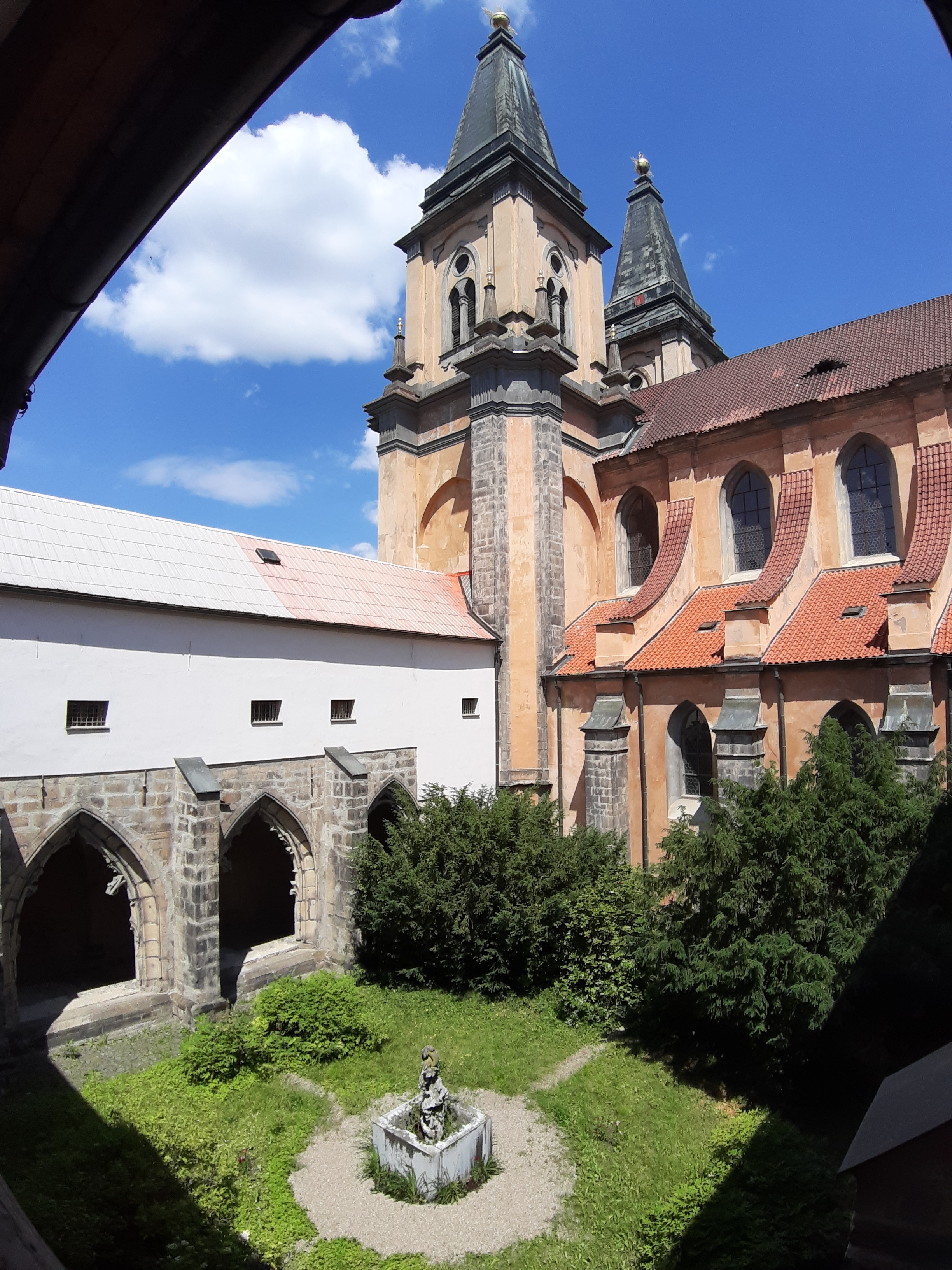 Roudnice nad Labem, Kostel Narození Panny Marie, klášterní ambit, stav 06/2020